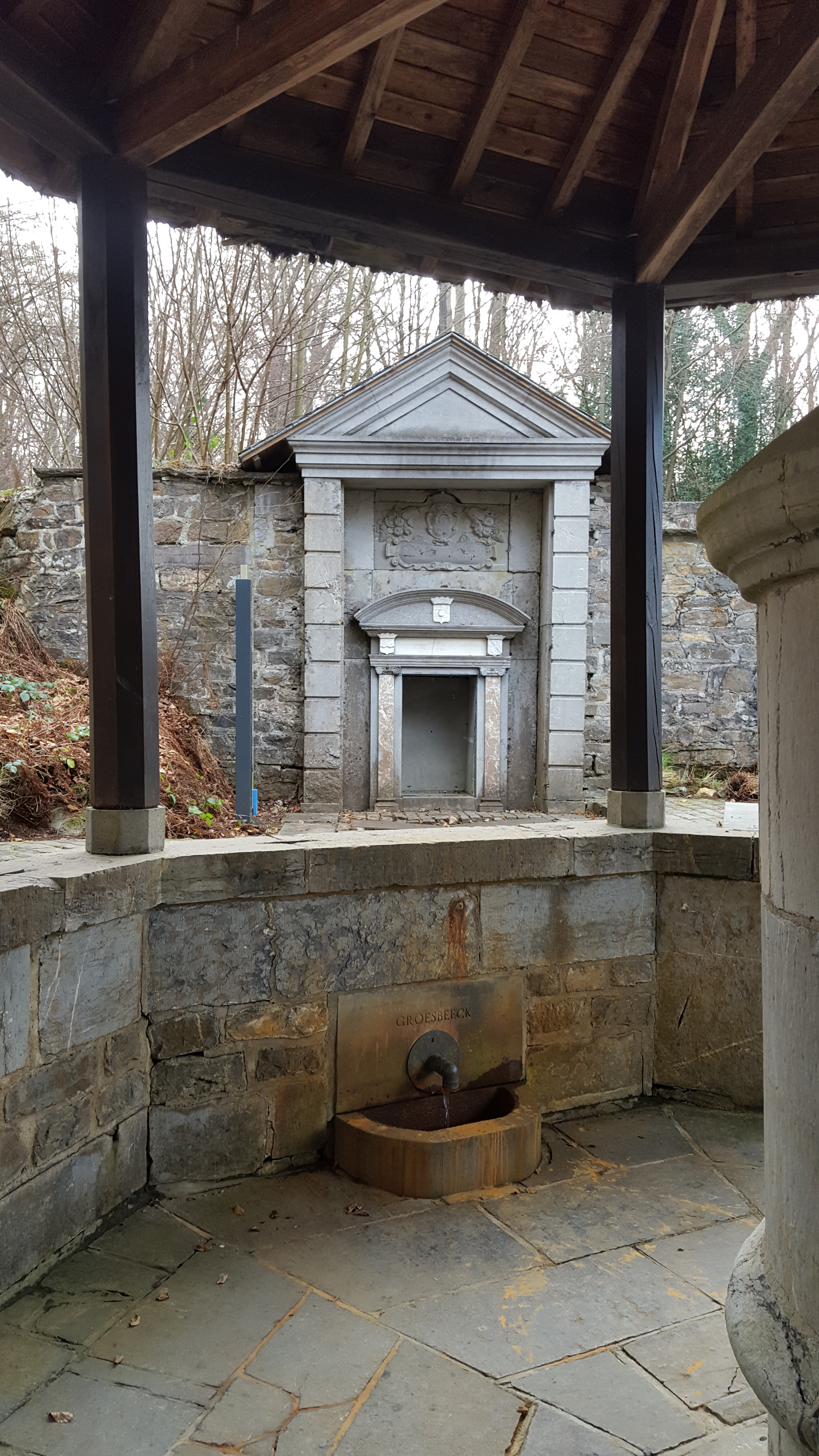 Source de Groesbeek, Spa, Belgique